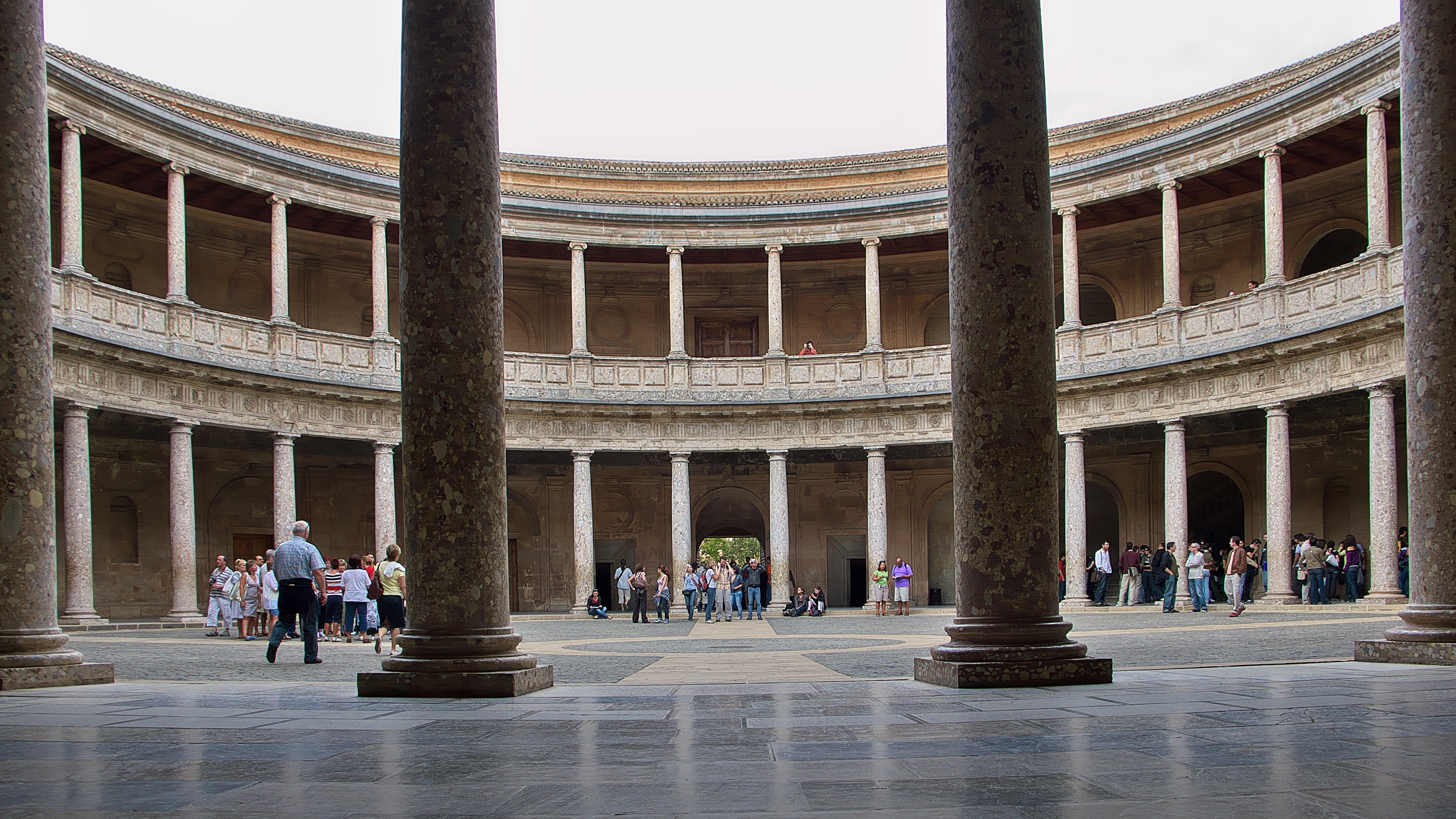 Carlos I de España y V del Sacro Imperio Romano Germánico encarga (1527) a Luis Hurtado de Mendoza y Pacheco, capitán general del reino de Granada, gobernador de la Alhambra, alcaide de Granada, conde de Tendilla y marqués de Mondéjar, el proyecto de su palacio en la Alhambra, que toma modelos romanos para el nuevo palacio imperial. Ref. File:001Tempietto-San-Pietro-in-Montorio-Rome.jpg